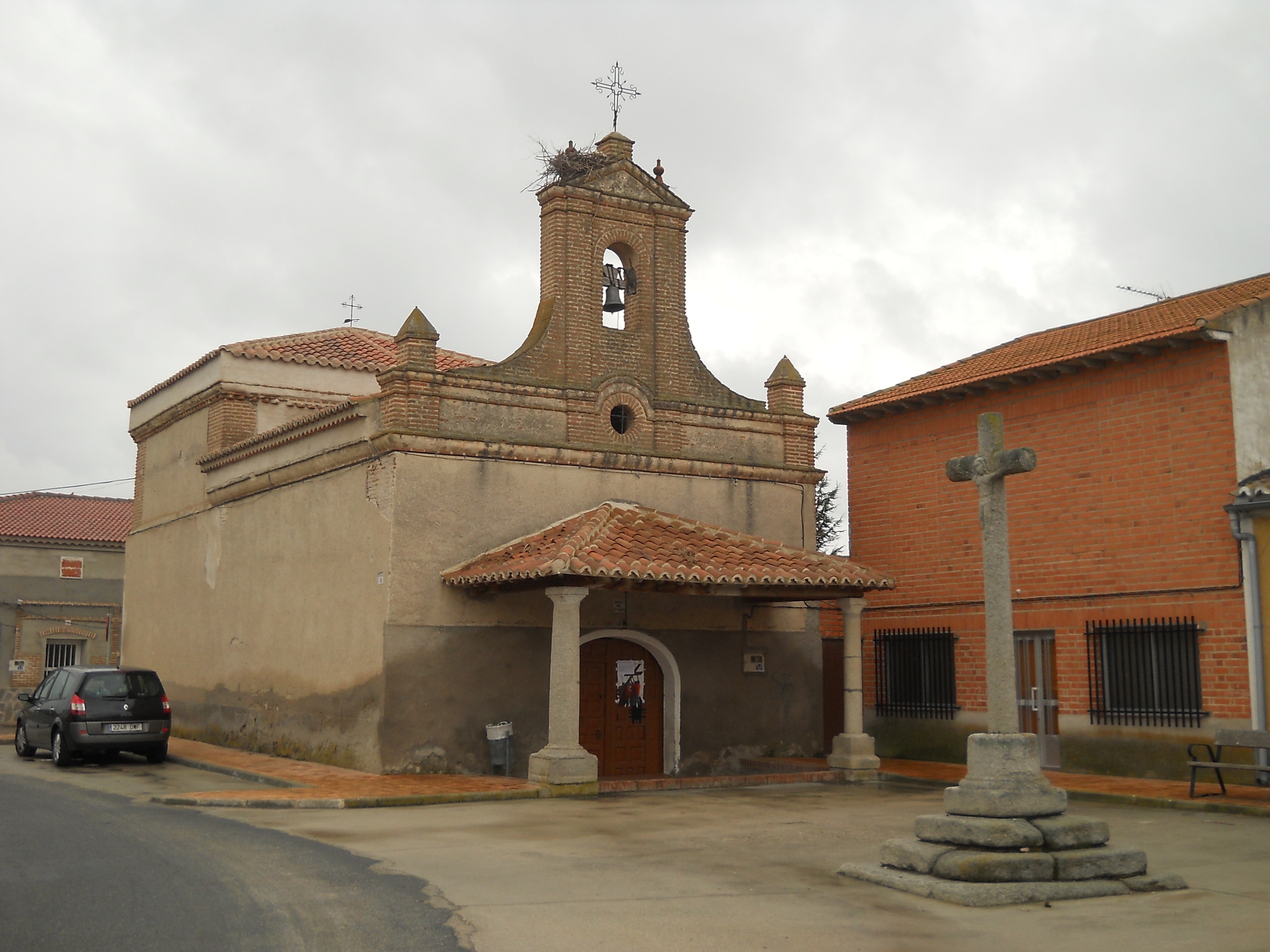 Cappella del Cristo, San Juan de la Encinilla, Ávila, Spagna